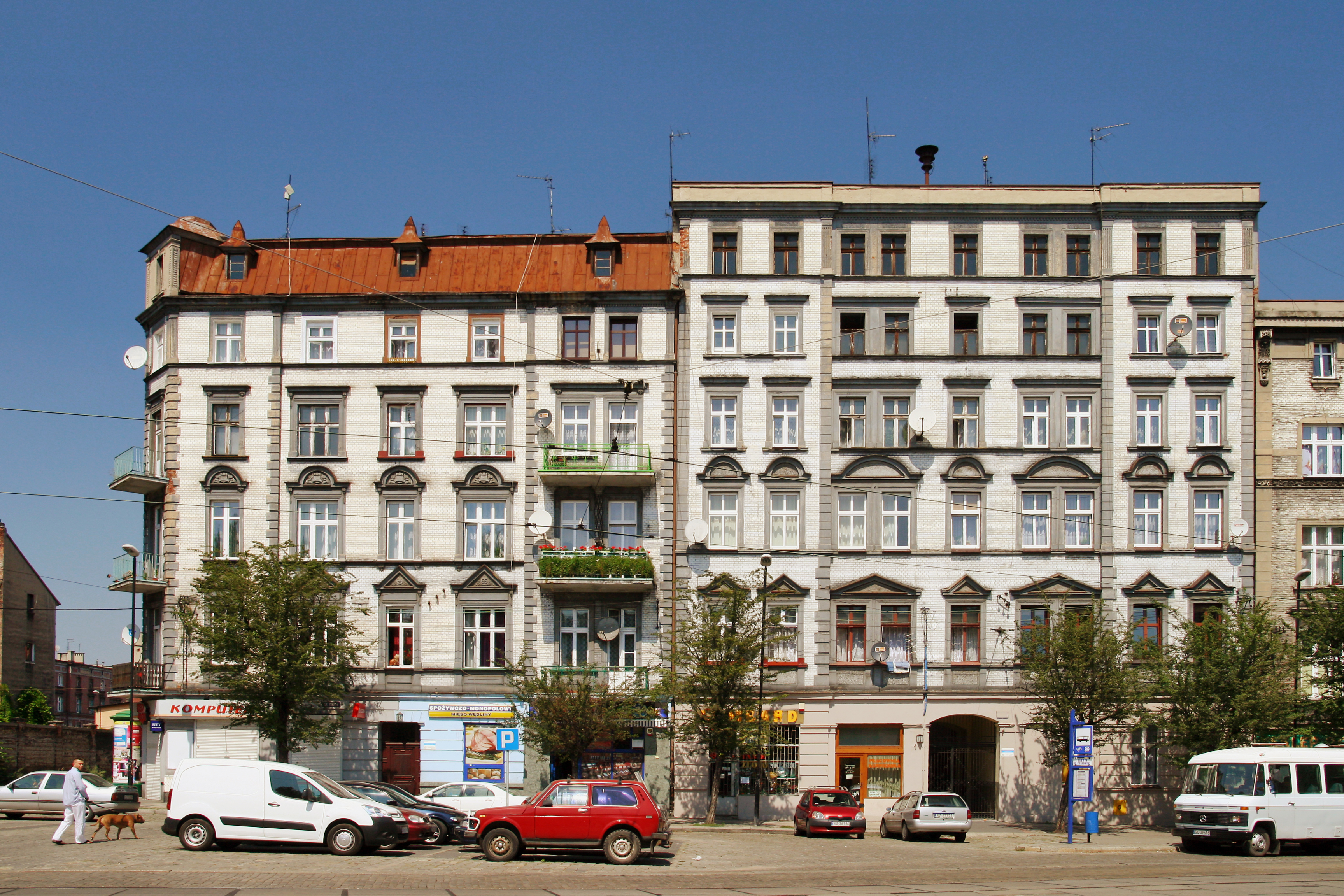 Budynki przy ul. Marcina Lutra (na wysokości Pl. Krakowskiego) w Zabrzu.